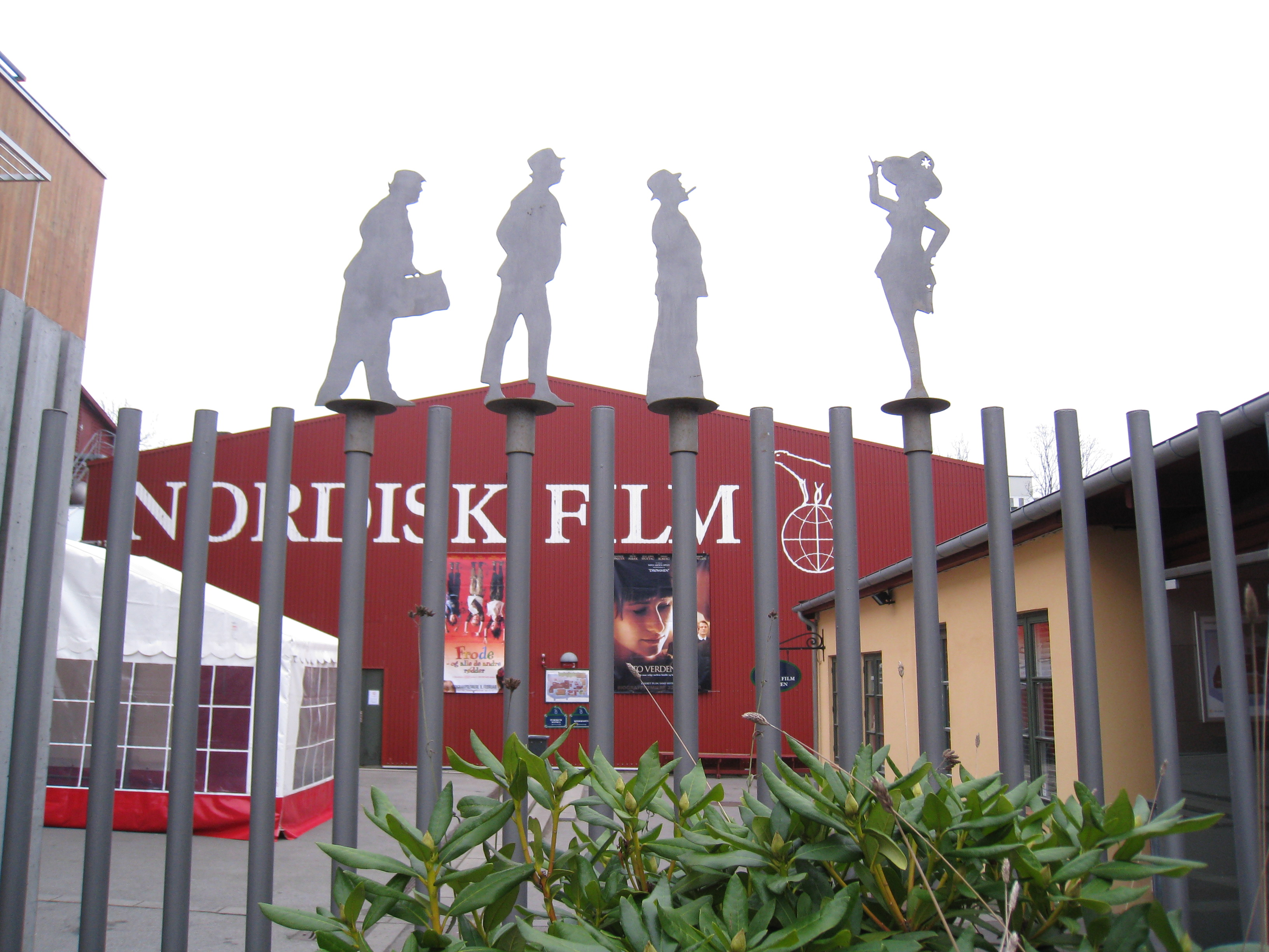 Nordisk film main gate